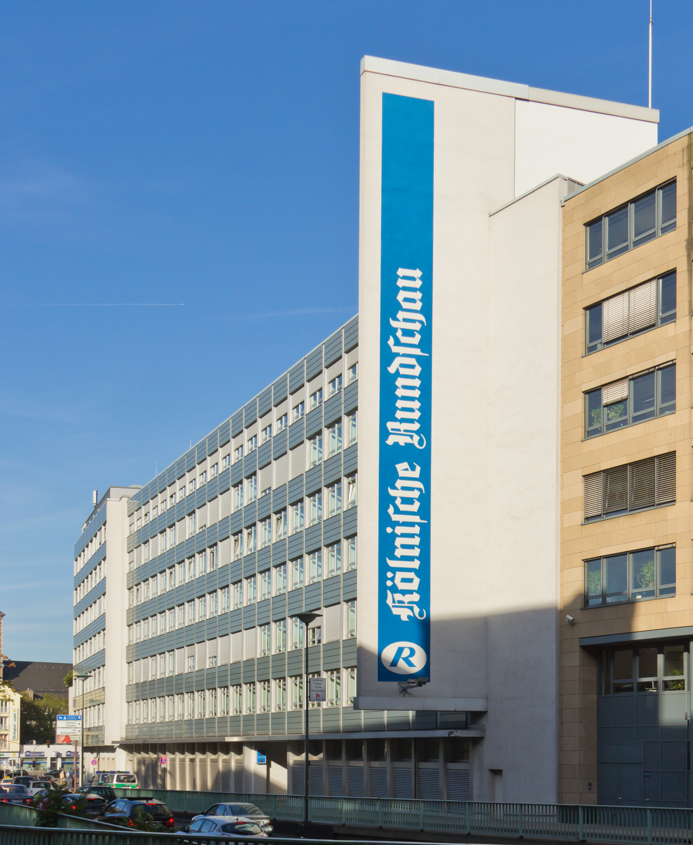 Kölnische Rundschau - Haus der Lokalredaktion Stolkstraße. Ansicht von der Tunisstraße.